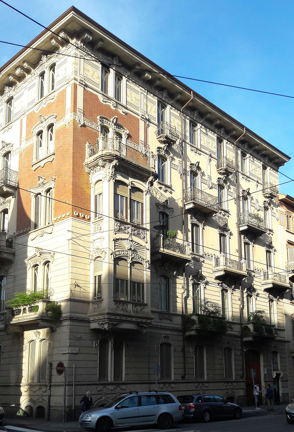 Edificio liberty in via Cibrario (Torino) - P. Fenoglio